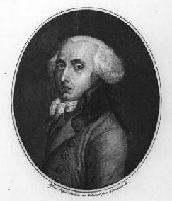 Portrait de Pierre Dezoteux de Cormatin (1753-1812), gravure au burin, réalisé d'après nature lors de son procès à Paris par François Bonneville.